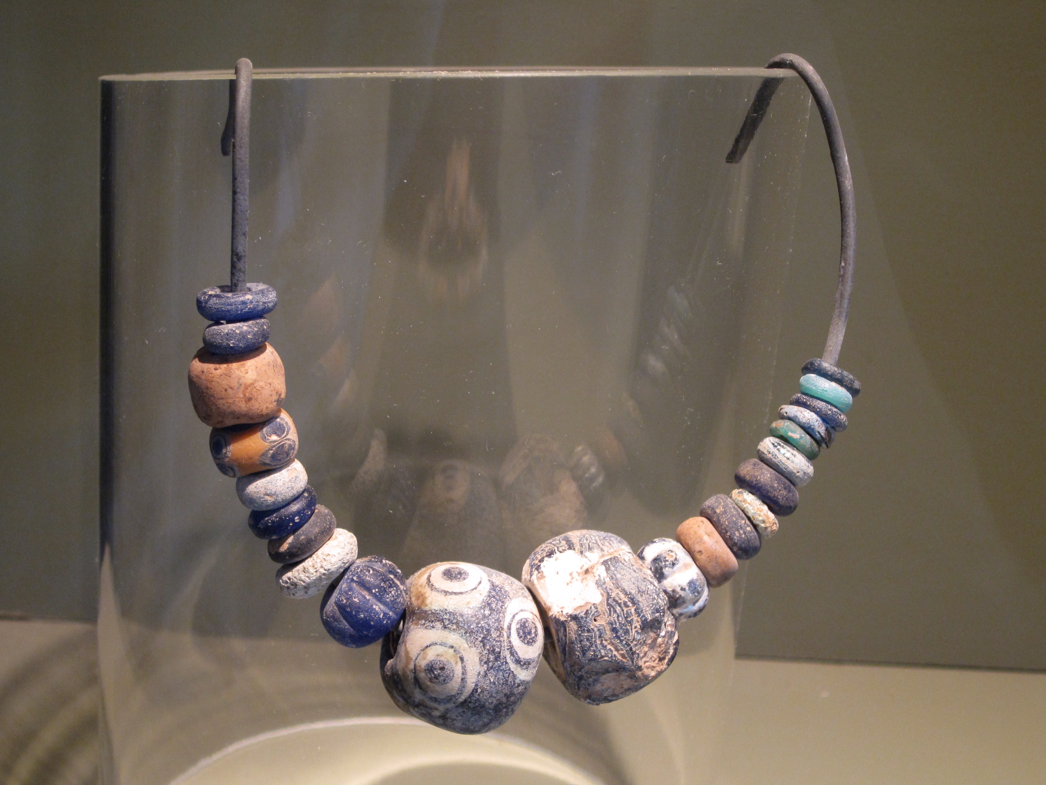 Schmuck aus der Zeit von 1100 bis 123 v. Chr. im Prähistorischen Saal des Historischen Museums von Manacor (Museu d’Història de Manacor), Herkunft unbekannt, Gemeinde Manacor, Mallorca, Spanien